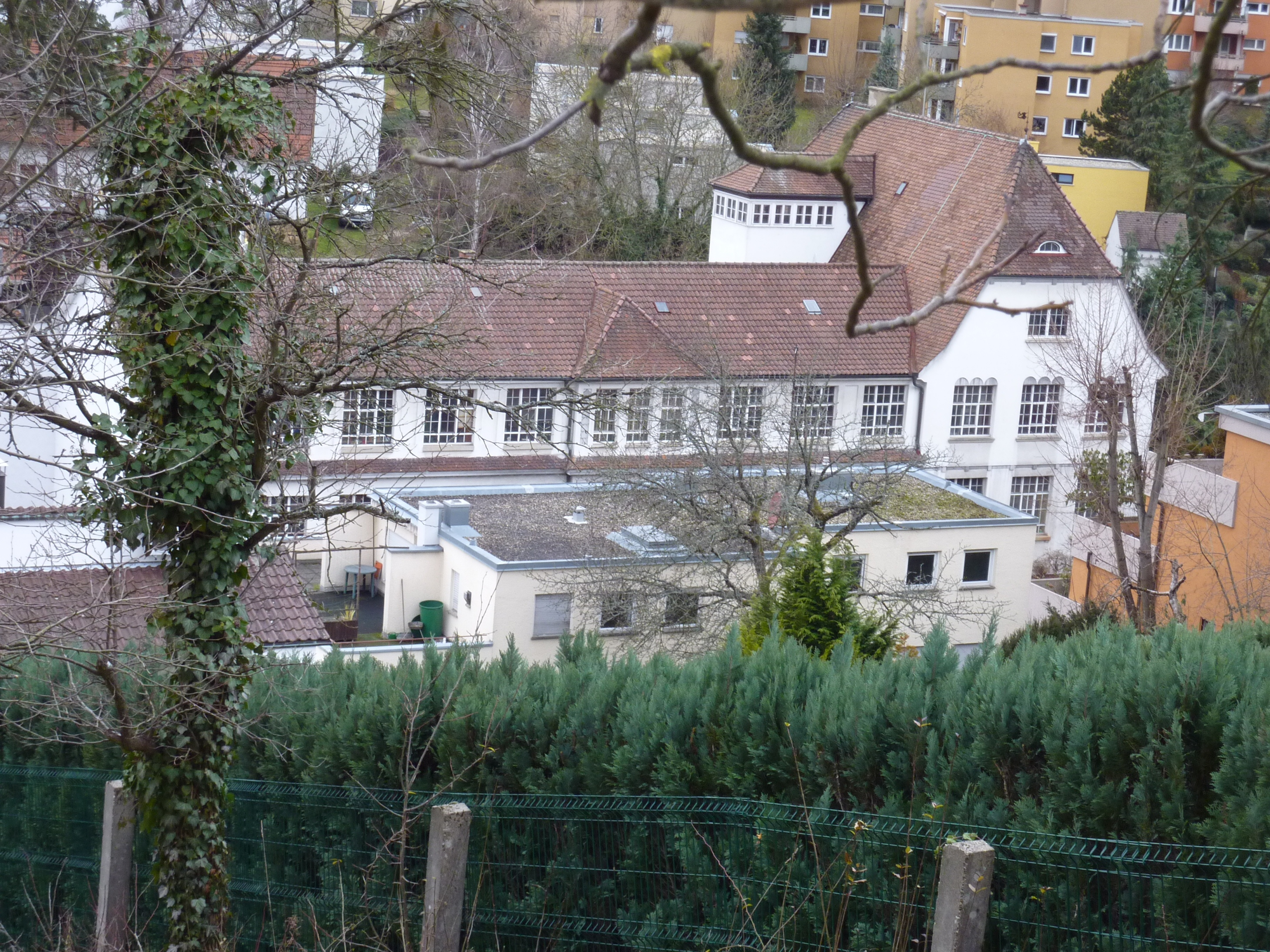 Krummenackerstr. 19, Esslingen, vom Helmensbergweg aus gesehen